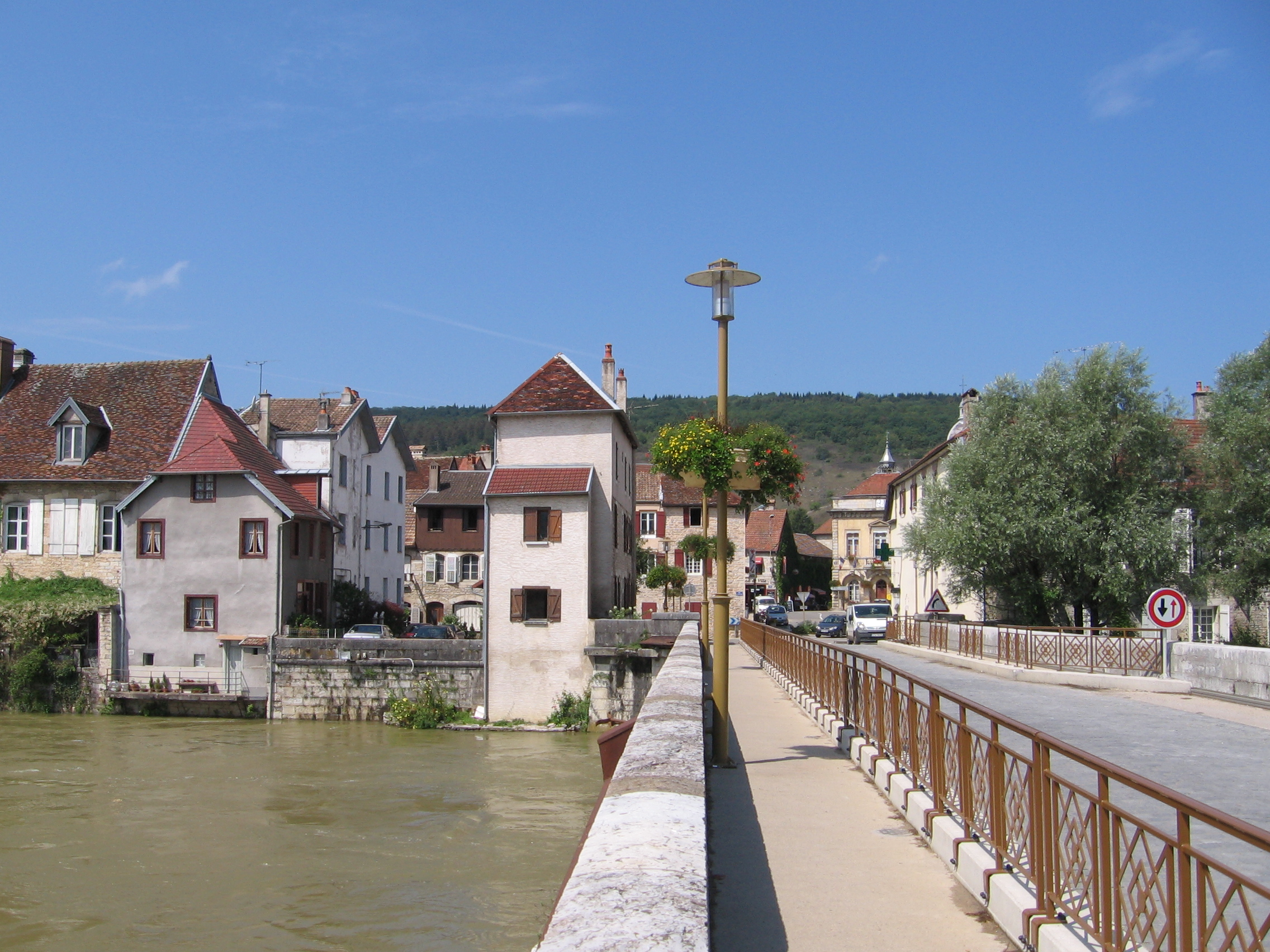 Quingey, Loue-river, France